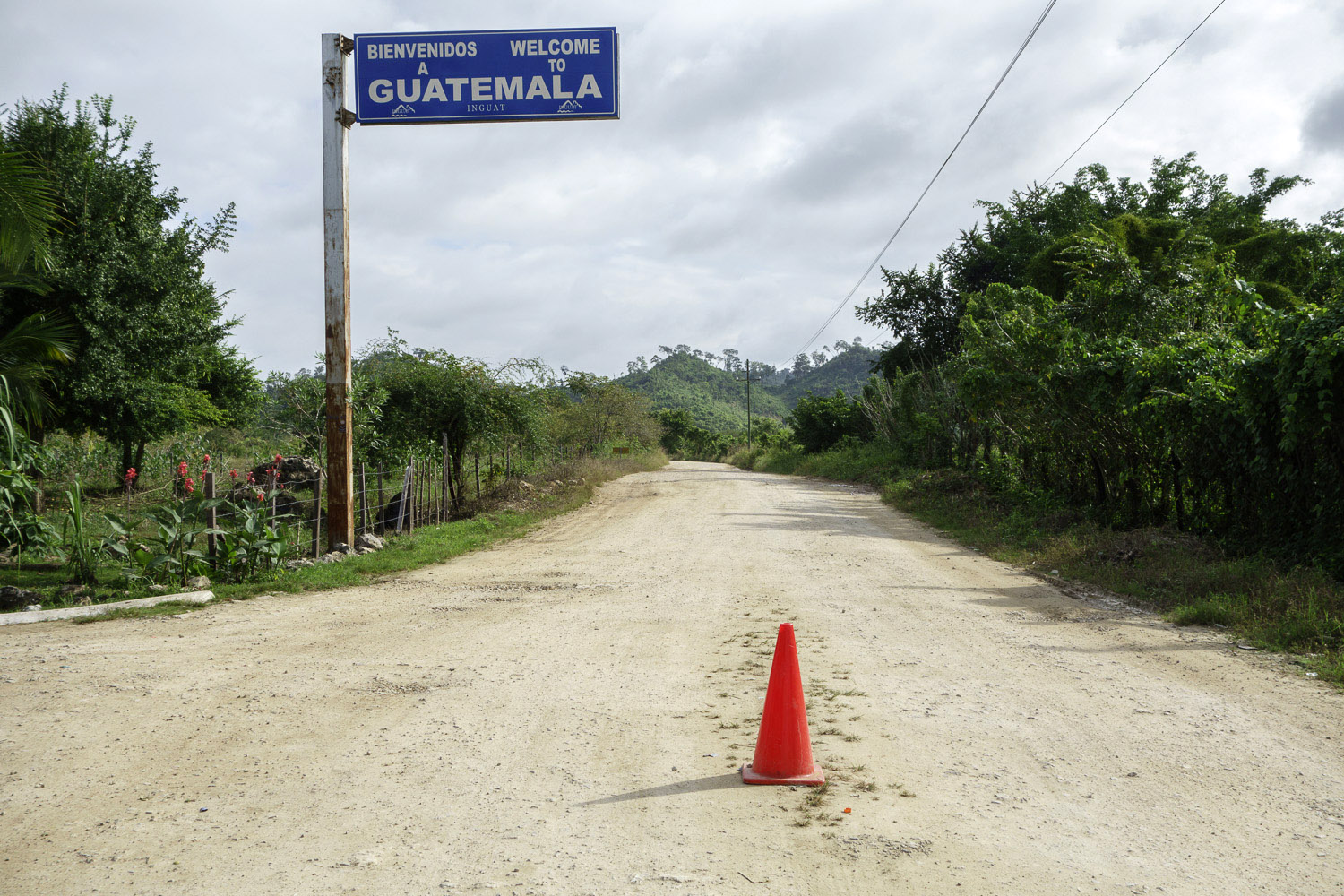 Frontera cerca de La Tecnica